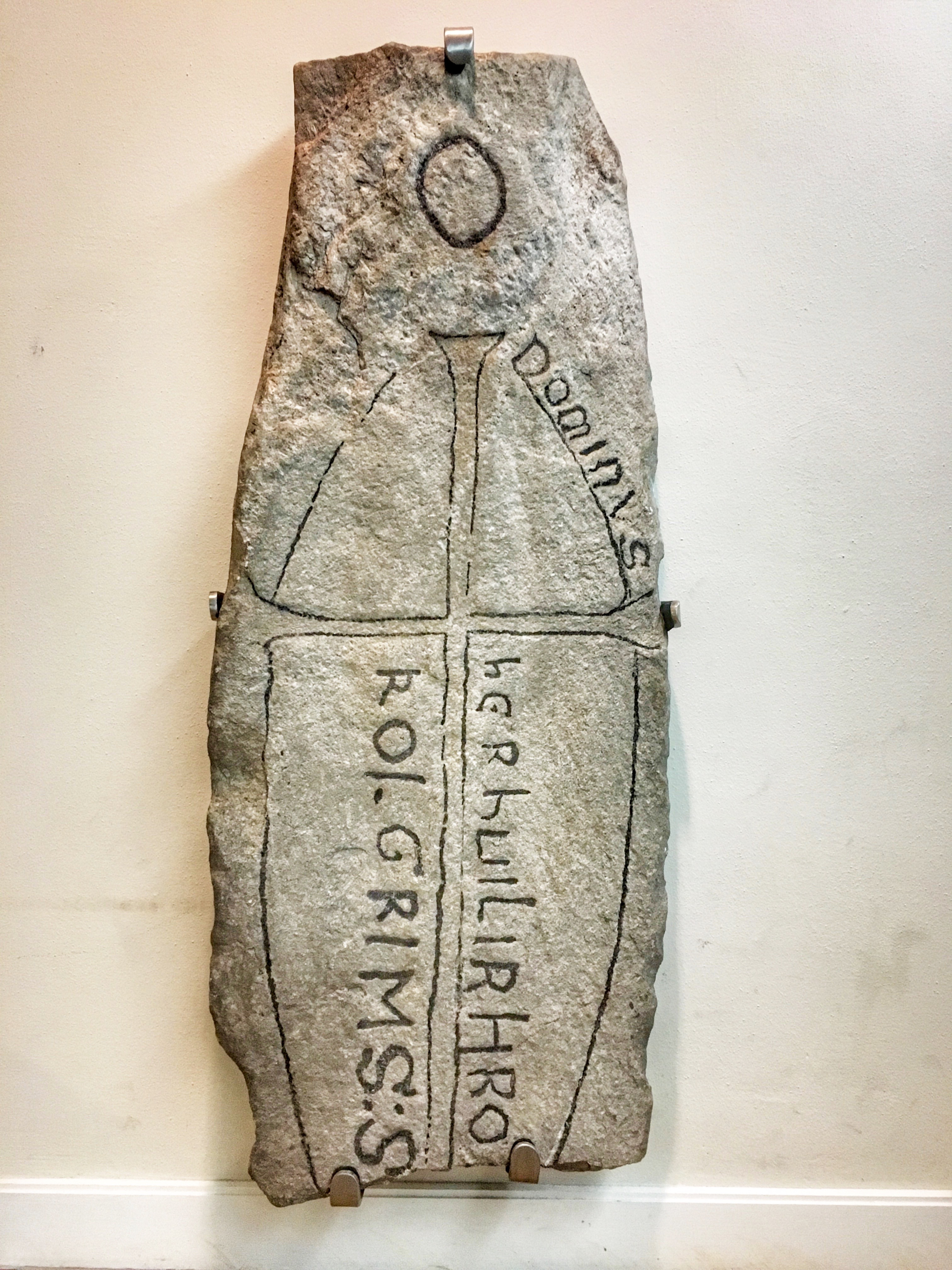 hER hUILIR HRO kOLGRIMS:S, gravsten af granit fra Herjolfsnæs (Ikigaat), Grønland. Nationalmuseet i København